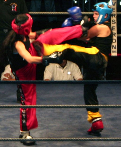 full-contact9.jpg